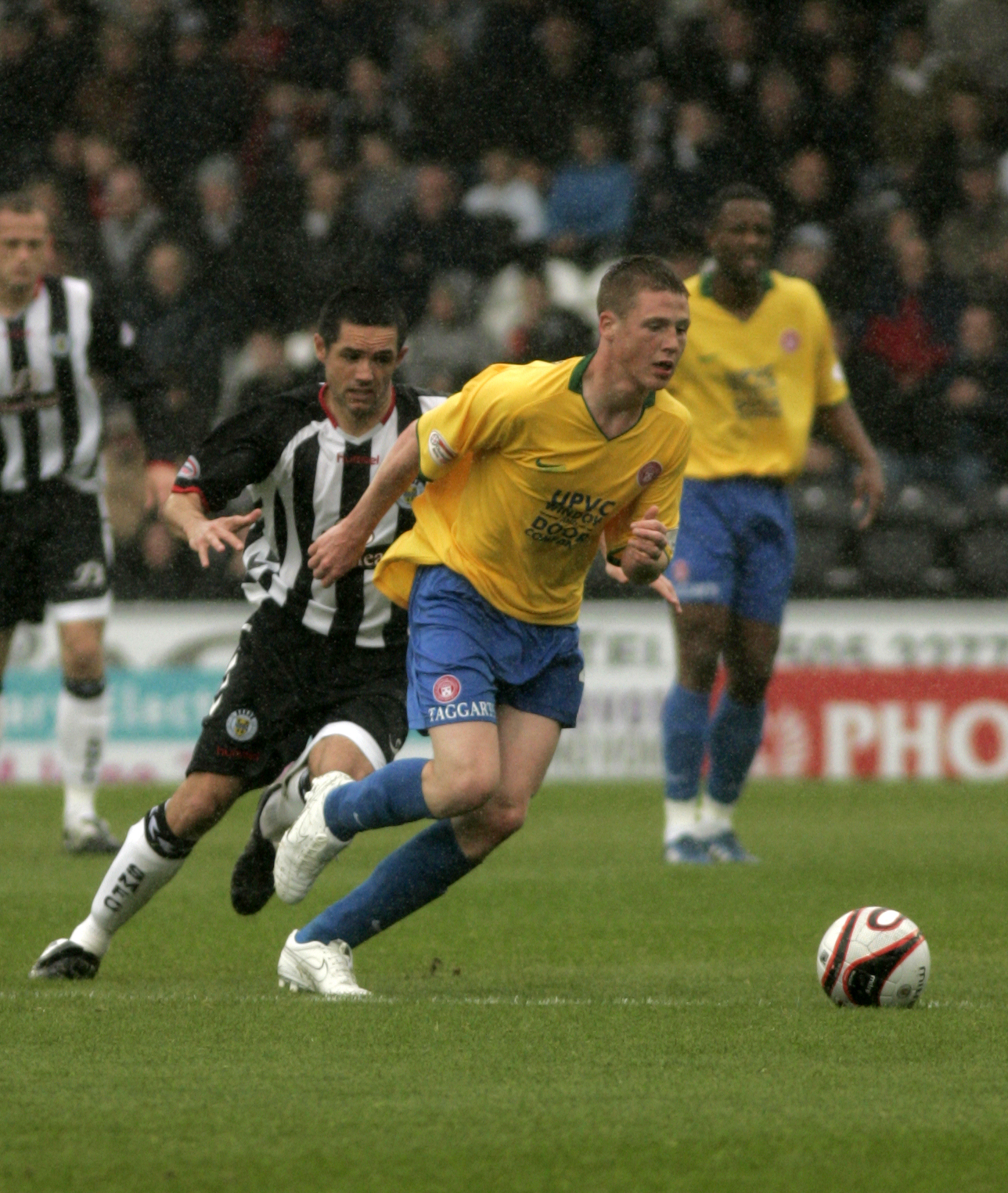 _I7Y7544